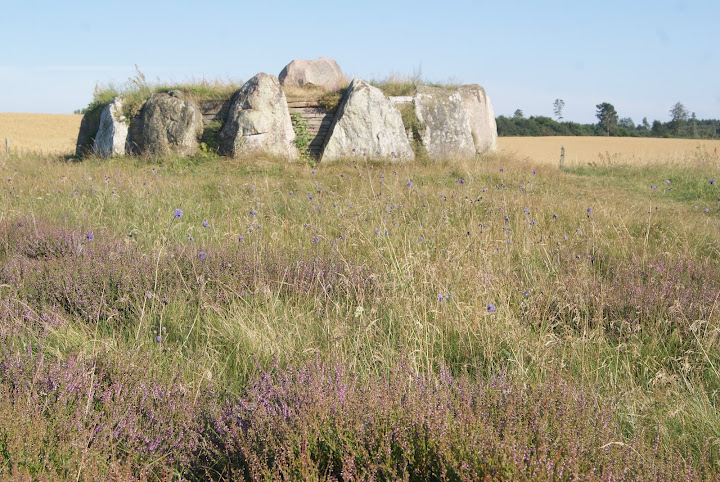 Tustrup Hovedgaard